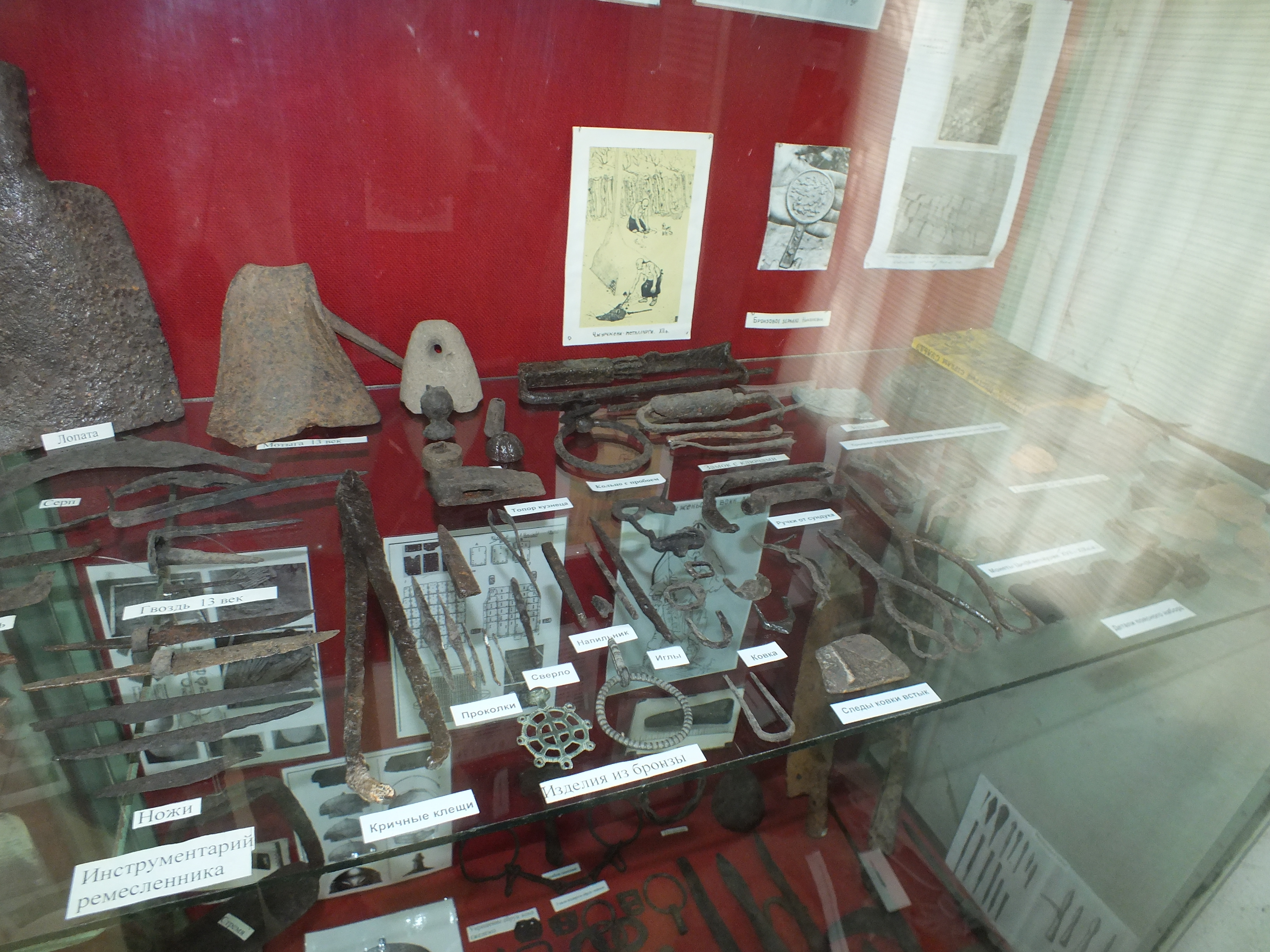 Olga, Primorsky krai